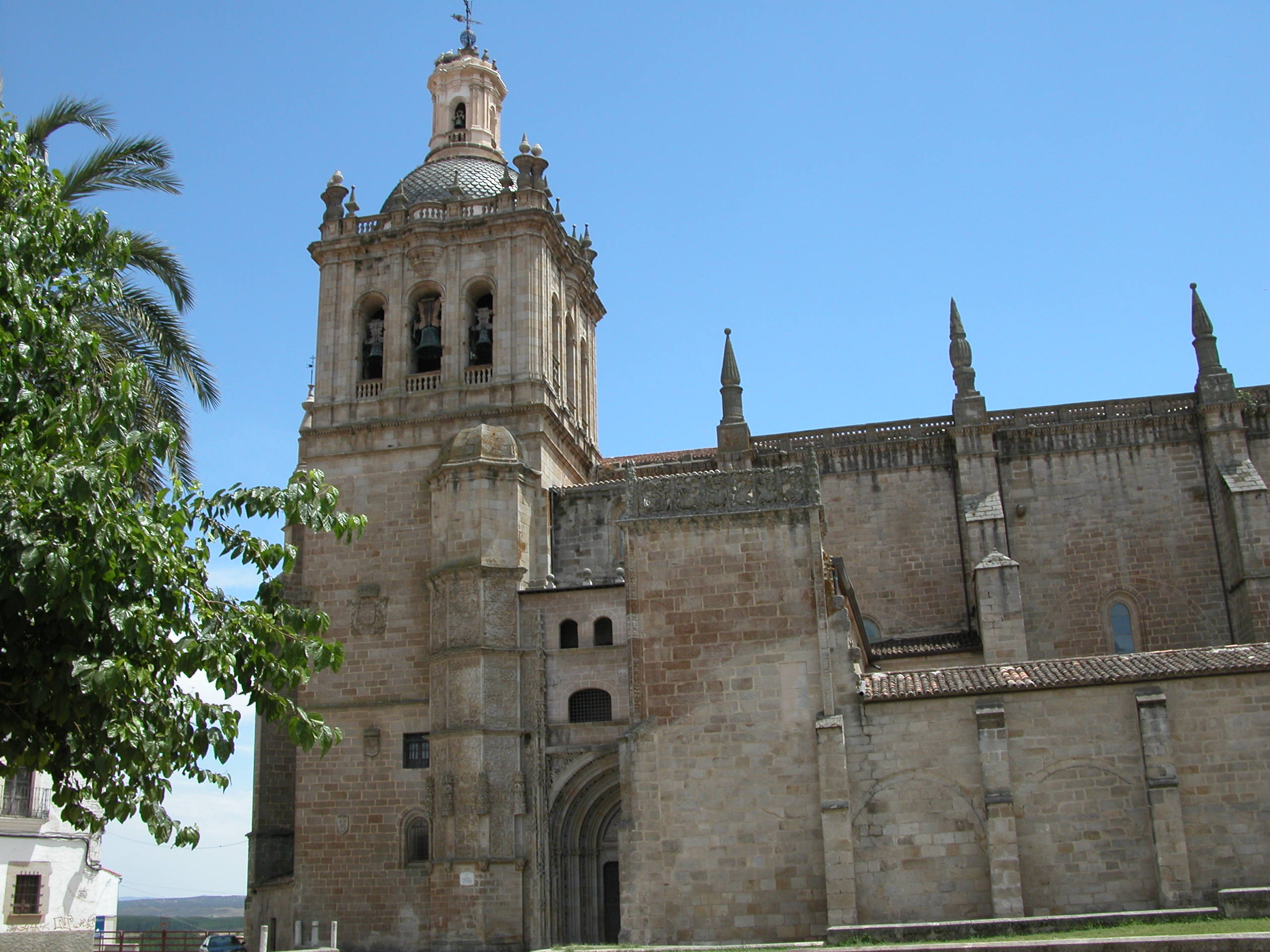 Vista exterior de la Catedral de Coria